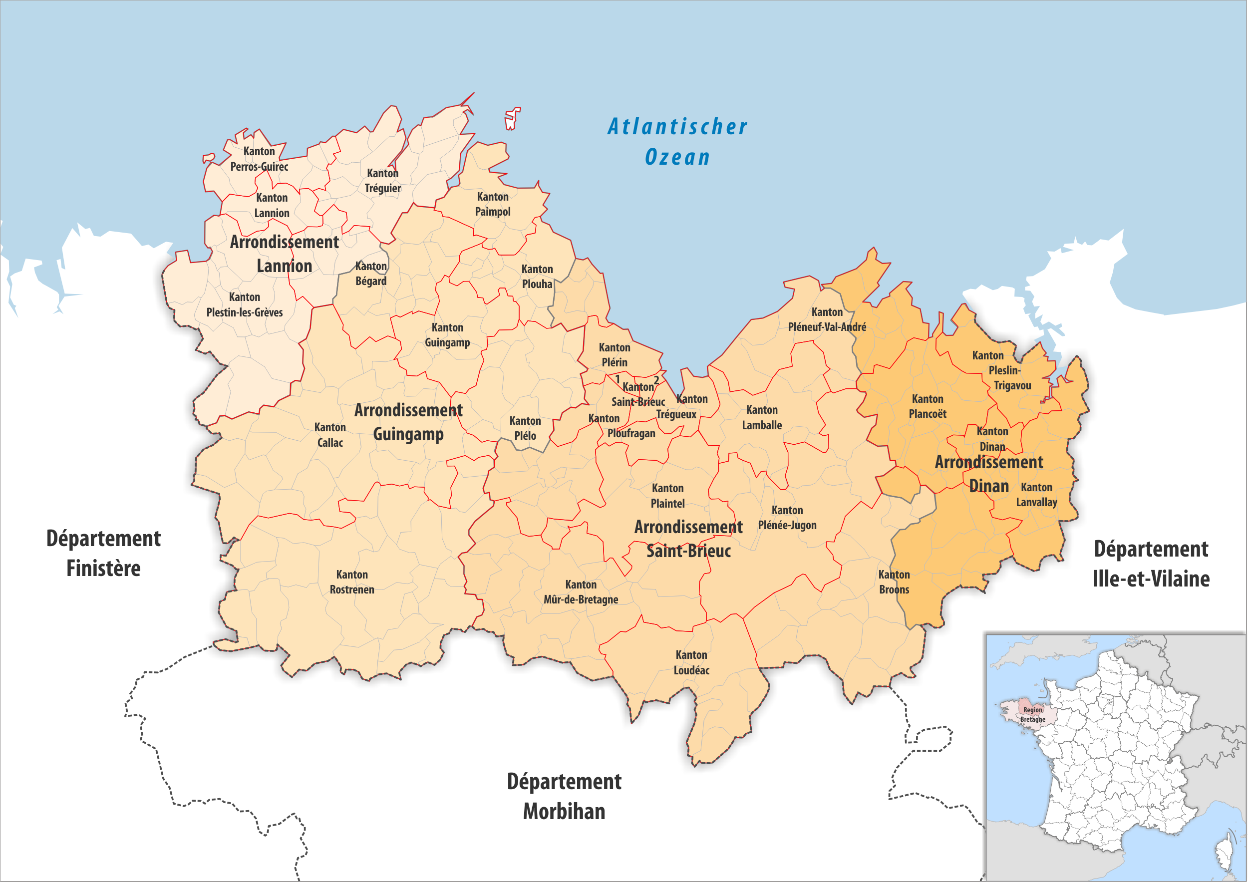 Gemeinden, Kantone und Arrondissemente im Departement Côtes-d’Armor